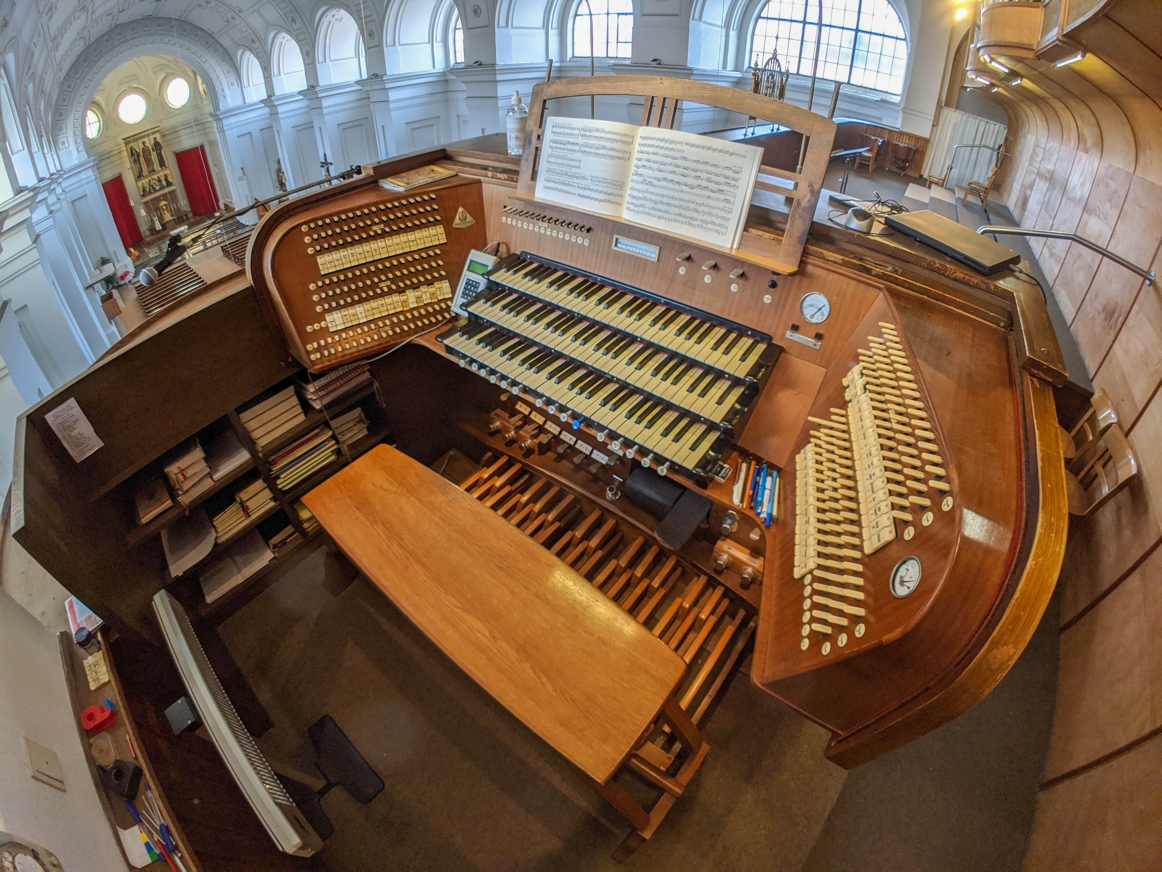 Der Spieltisch der Orgel von St. Joseph in München